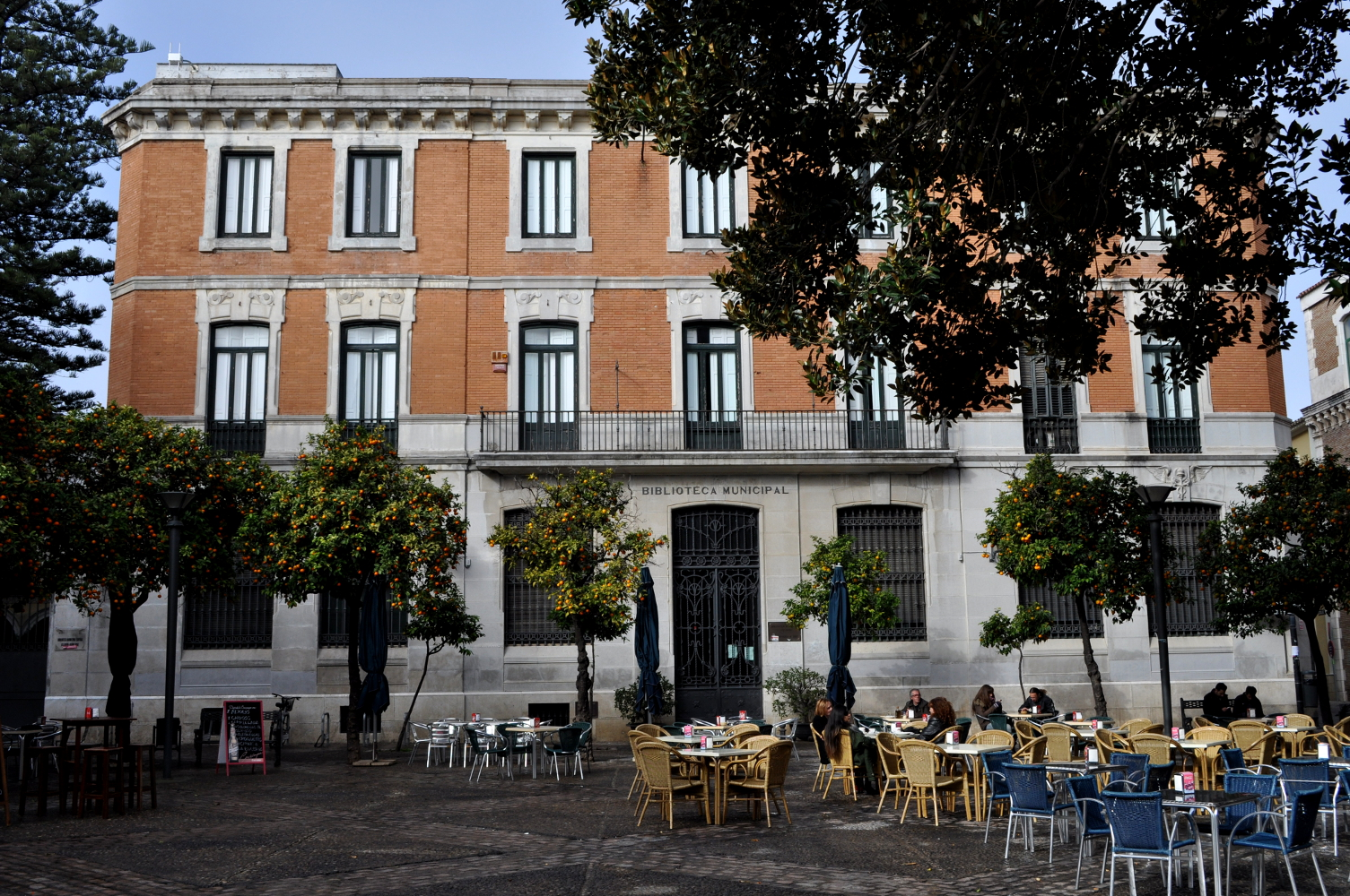 Biblioteca Municipal Jerez de la Frontera. Edificio Principal. Alameda del Banco.